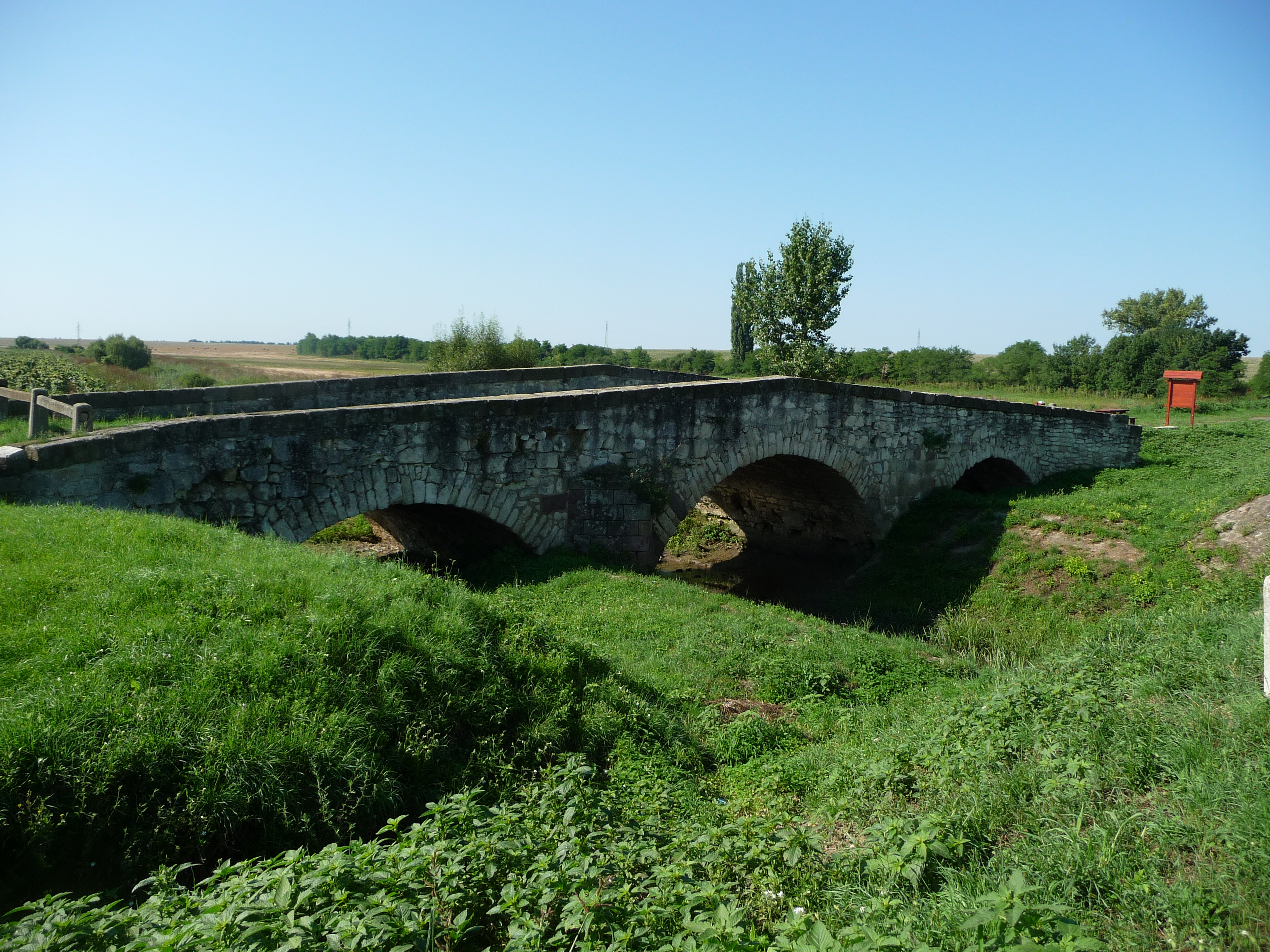 Műemlék kőhíd Héhalmon